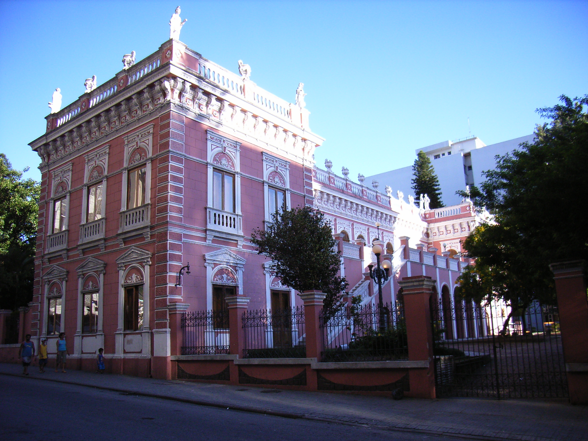 Palácio Cruz e Sousa, Florianópolis, Brasil.